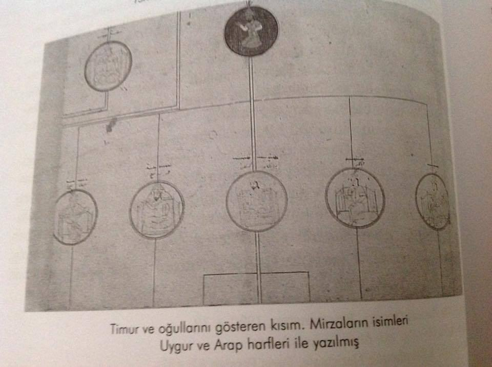 Timur ve Oğullarını gösteren kısım.Mirzaların isimleri Uygur ve Arap harfleri ile yazılmış.